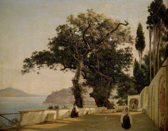 "Veduta del golfo di Napoli", olio su tela, 48.5 x 62.5 cm.